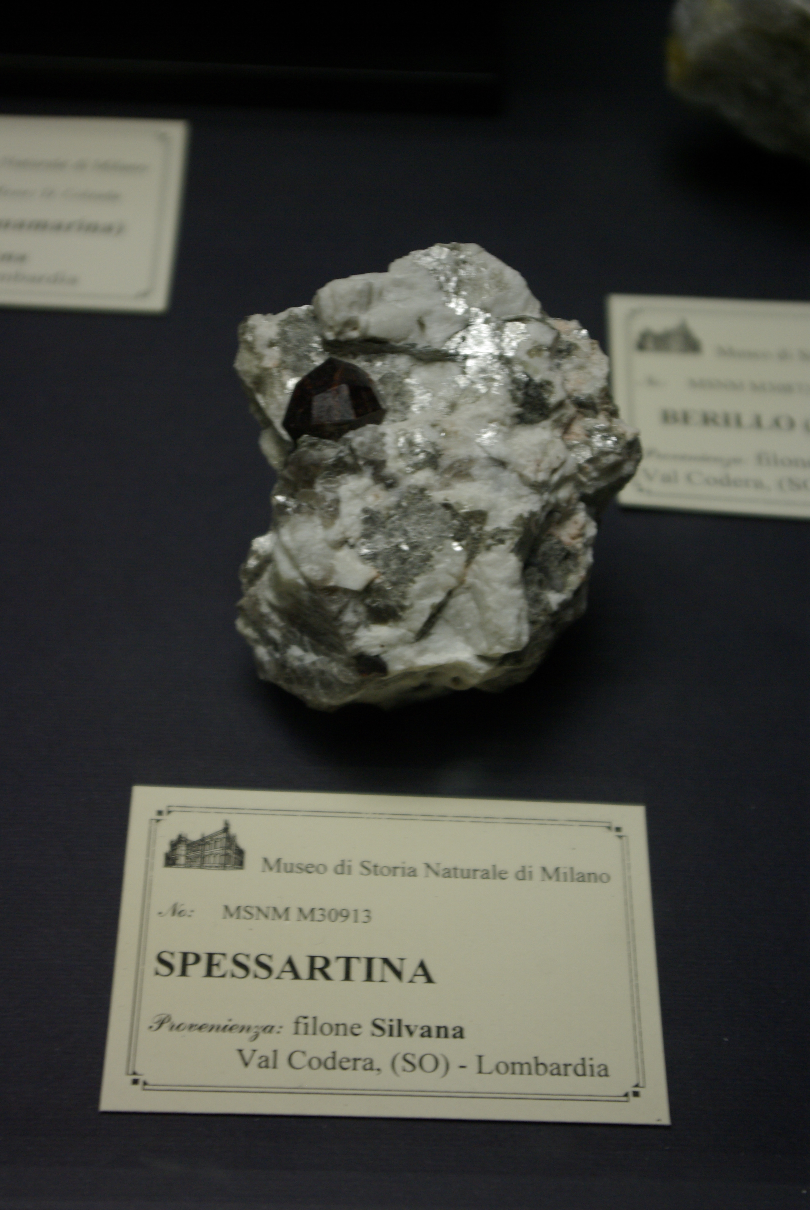 Museo civico di storia naturale This is a photo of a monument which is part of cultural heritage of Italy.